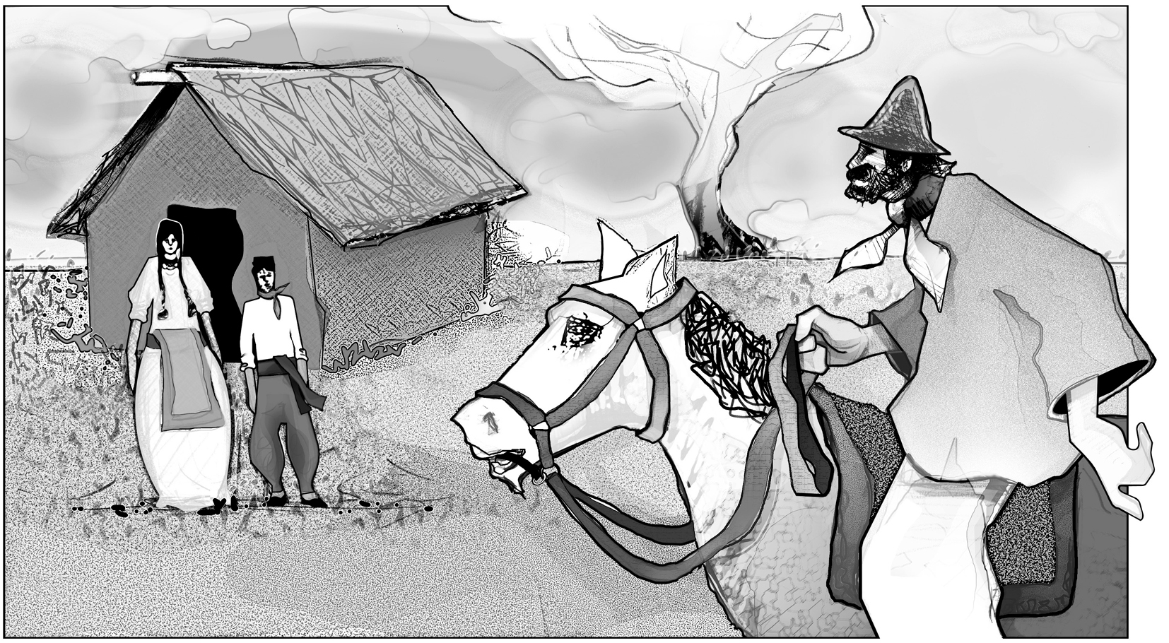 Dibujo demostrativo de la vida en el campo antes de la colinización, con familia gaucha